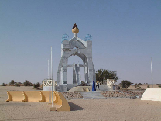 [Auteur:fr:Utilisateur:Taguelmoust Monument commémorant la cérémonie de "La Flamme de la Paix". GFDL Utilisateur:Taguelmoust janvier 2003